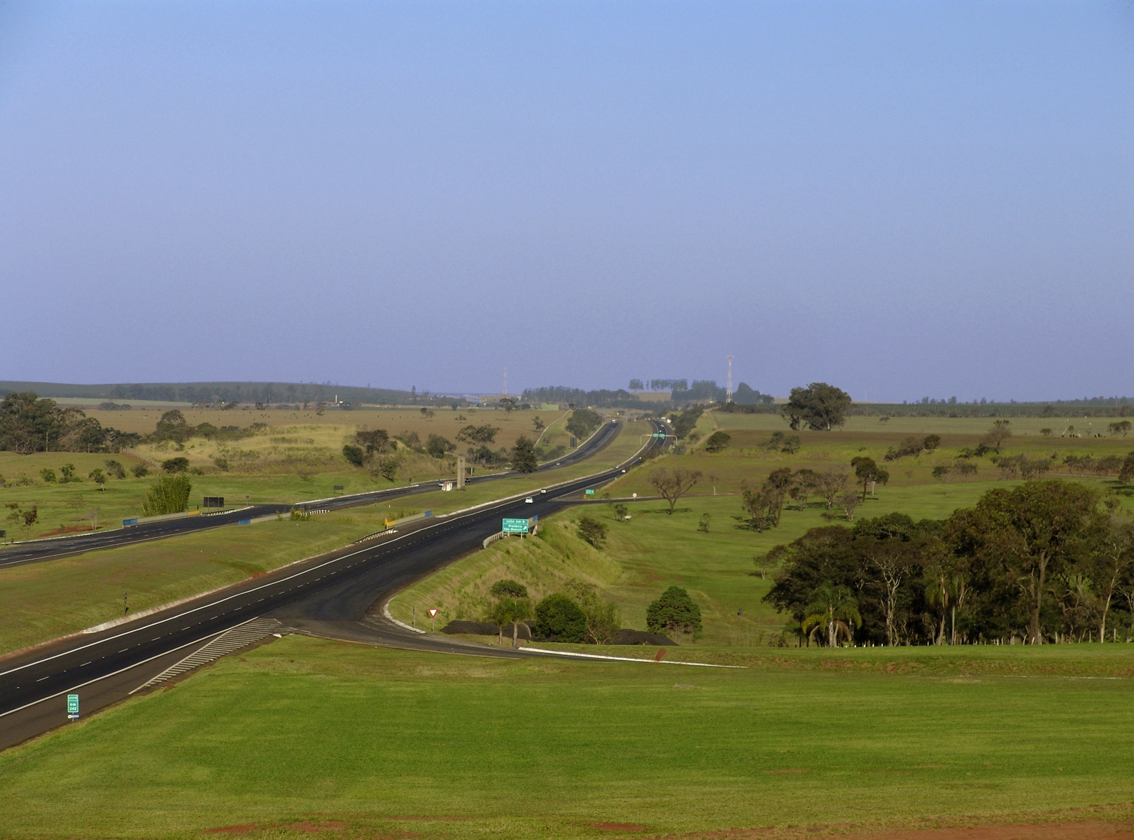 Trevo da Rodovia Castelo Branco x Rodovia João Melão Avaré